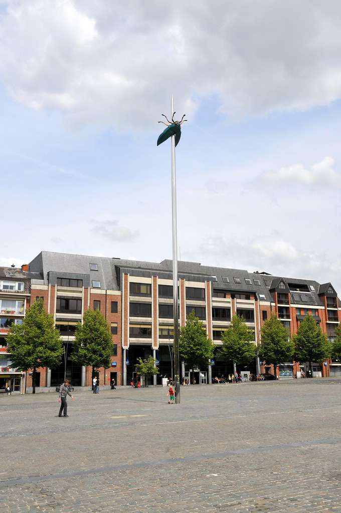 In 2005 werd een kunstwerk van de kunstenaar Jan Fabre op het Ladeuzeplein geplaatst: de Totem, een 23 meter hoge inox naald met daarop een omgekeerde kever gespiest. Het is een geschenk van de van de Katholieke Universiteit Leuven aan de stad Leuven ter gelegenheid van de 575ste verjaardag van de universiteit. Fabre gebruikt de kever vaak als metafoor: het opspelden van een kever tegen de hemel. Het insect als hemellichaam.